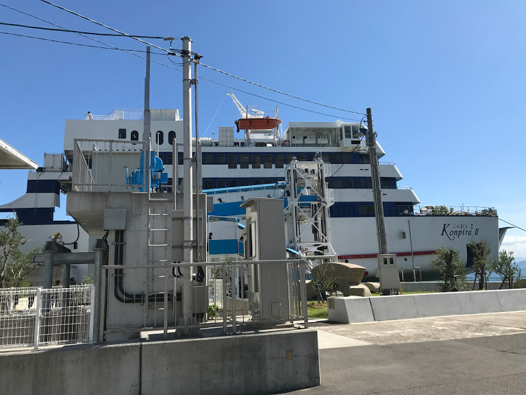 2017年8月13日撮影